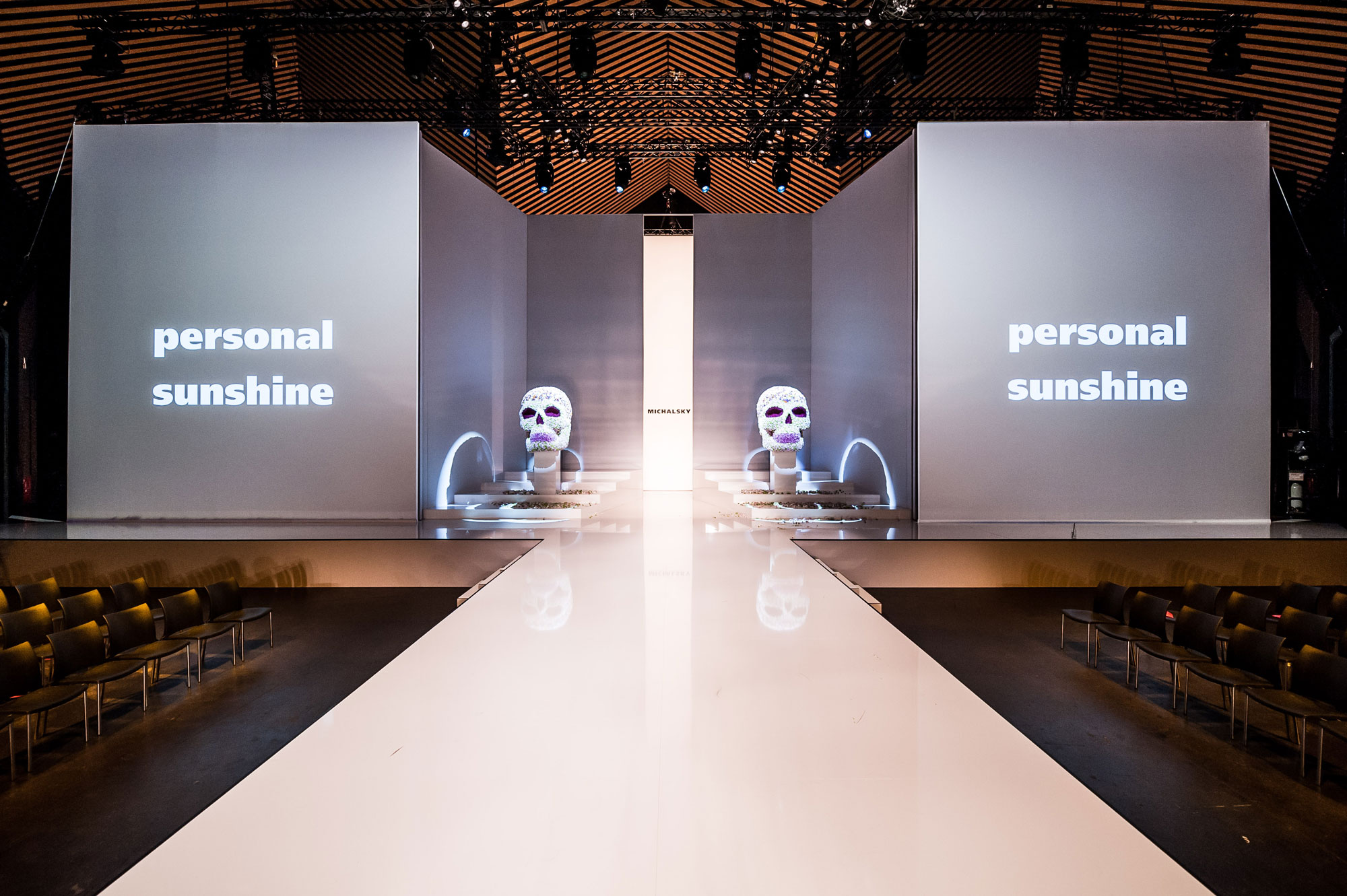 Deitsch: MICHALSKY StyleNite Bühne, Juli 2012